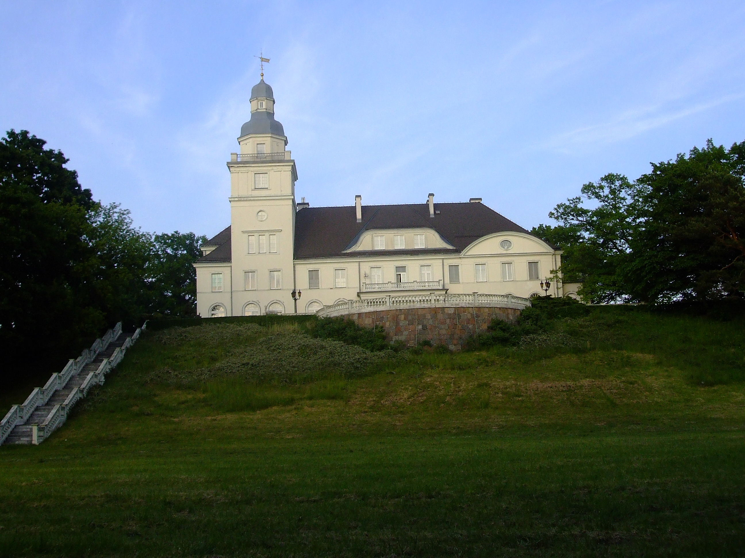 Pałac w Koszewie